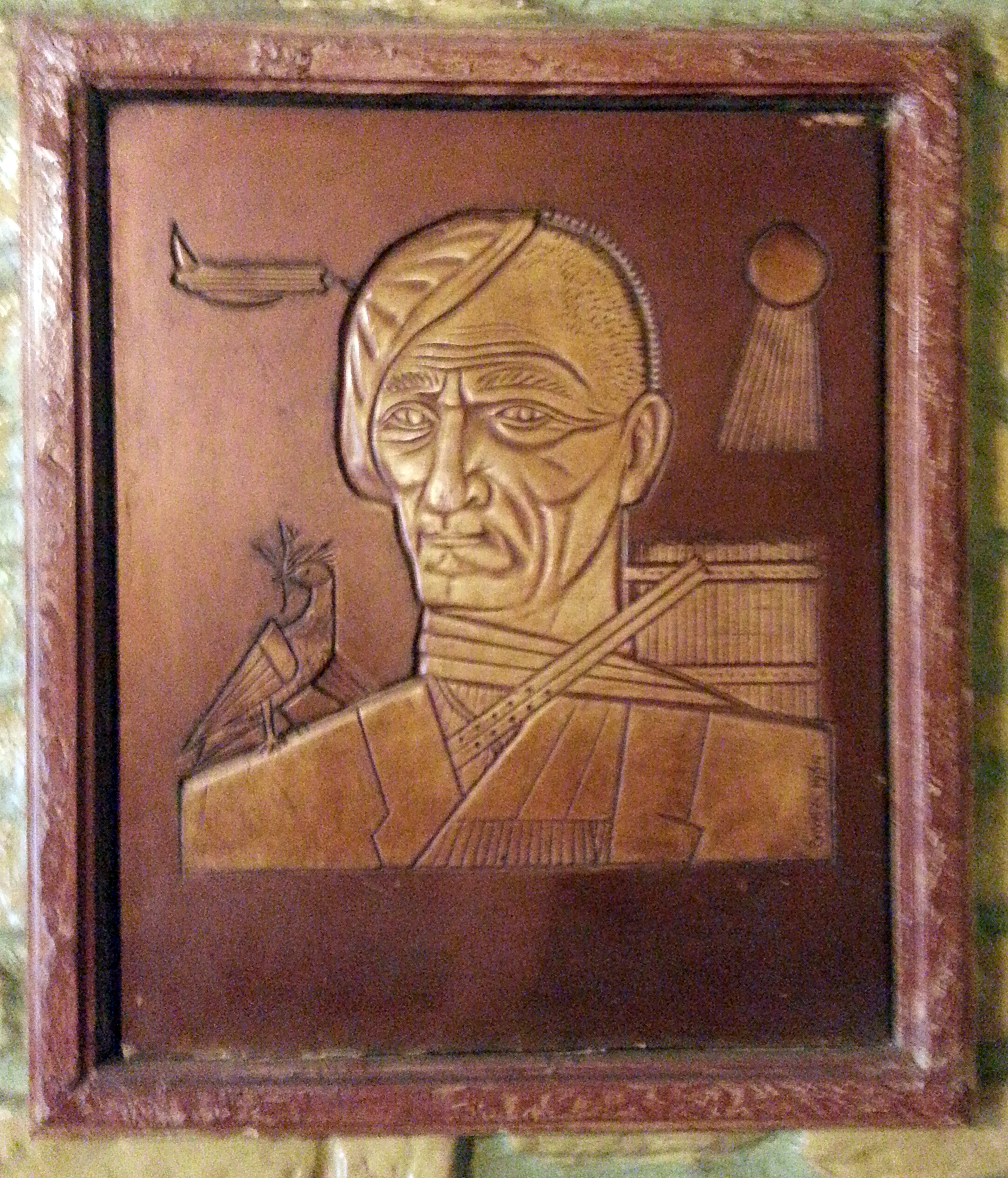 Tersánszky Józsi Jenő portréja Boda Péter alkotása. Budapest, XII. Márvány utca 27 borozó Tersánszky emléksarok.